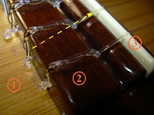 Zimmermannsknoten